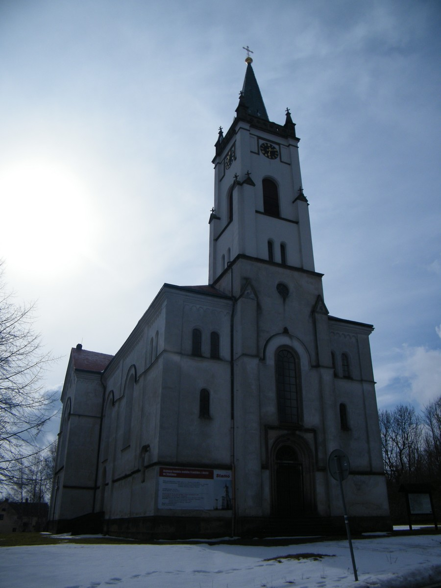 Kostel svatého Františka z Assisi, Studánka